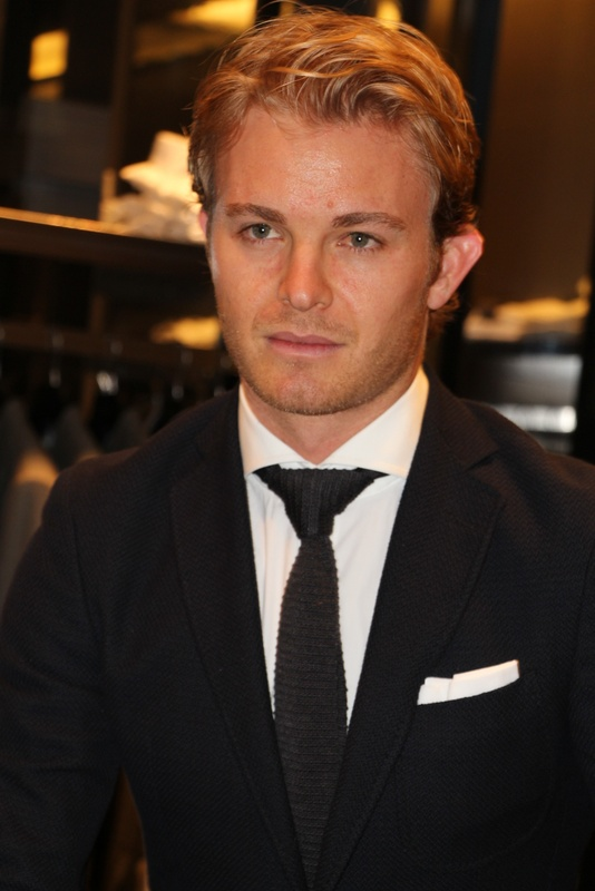 Nico Rosberg-004